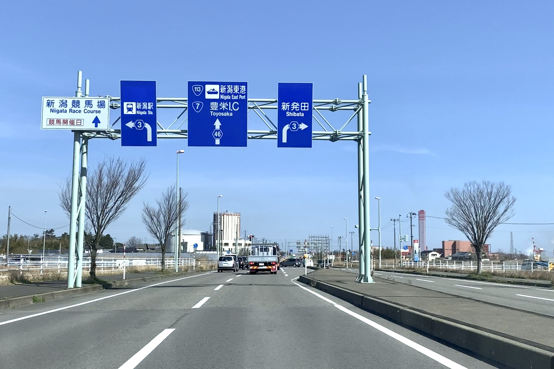 新潟県道46号新潟大外環状線 北区内島見付近（2020年3月）